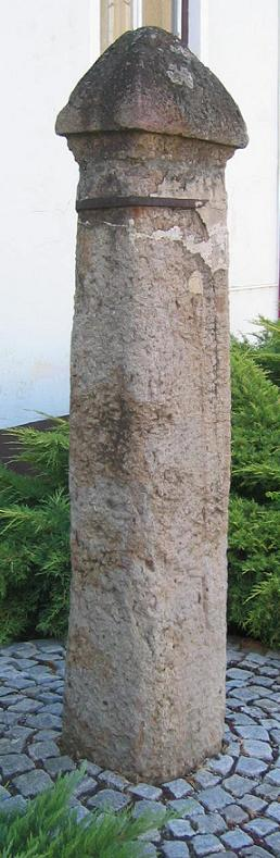 Stone of disgrace, Rečica ob Savinji, village in Slovenija photo:Ziga 20:03, 18 August 2006 (UTC)